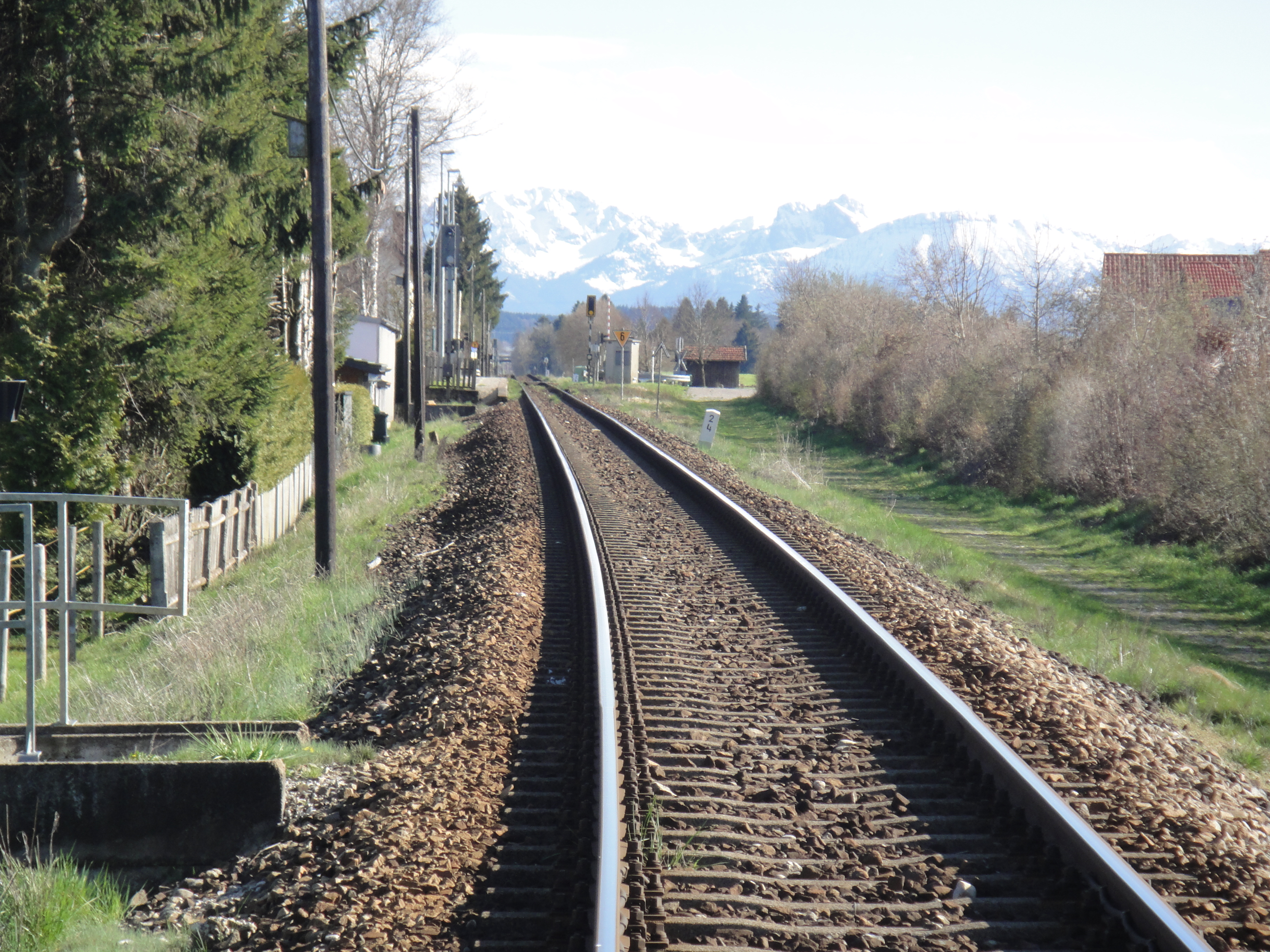 Bergblick bei Streckenkilometer 2,2 (Bahnübergang Ebenhofen) auf der eingleisigen KBS 974 (Biessenhofen-Füssen)